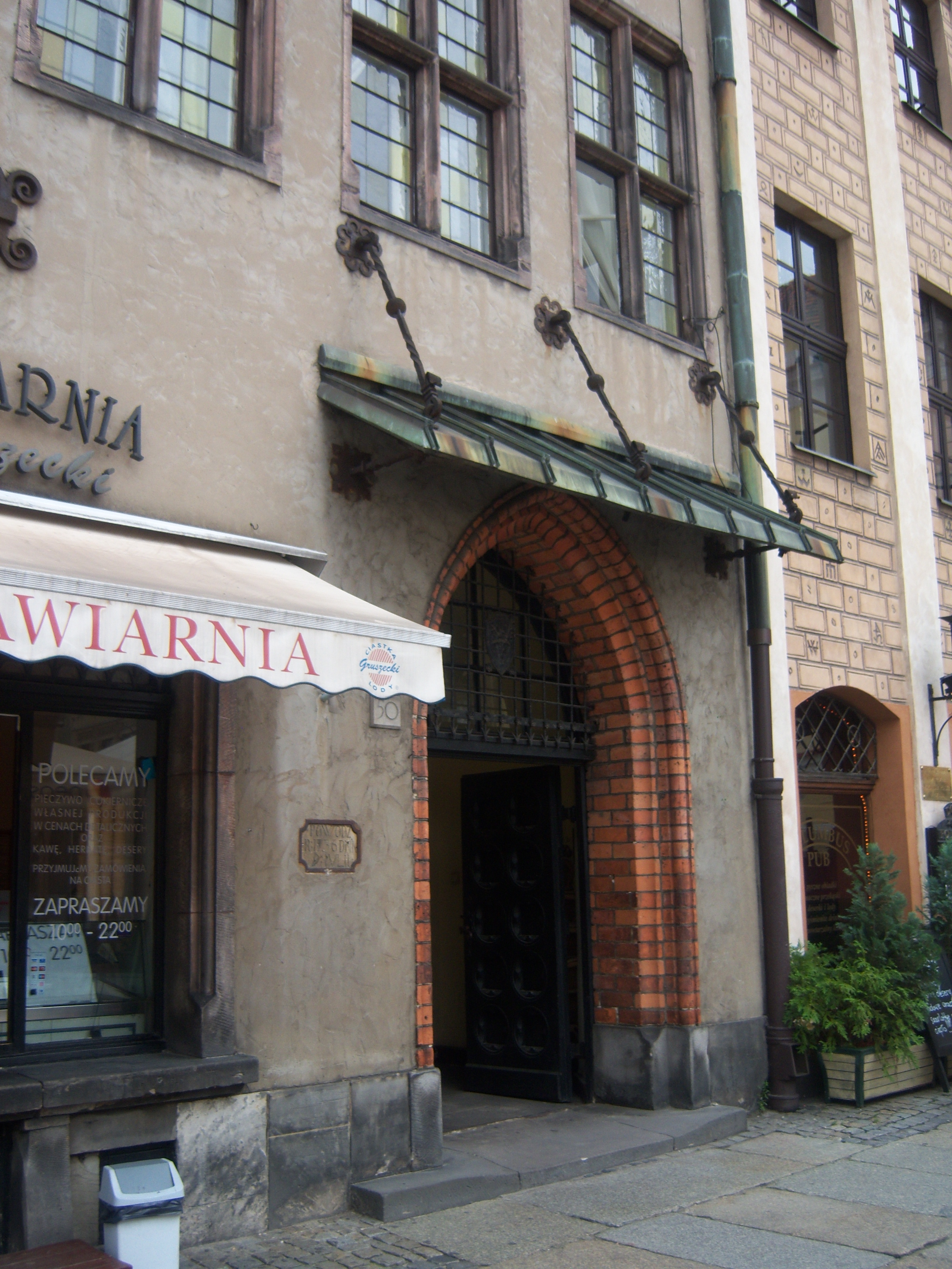 Poznań, Stary Rynek 50 - kamienica (zabytek A 086)